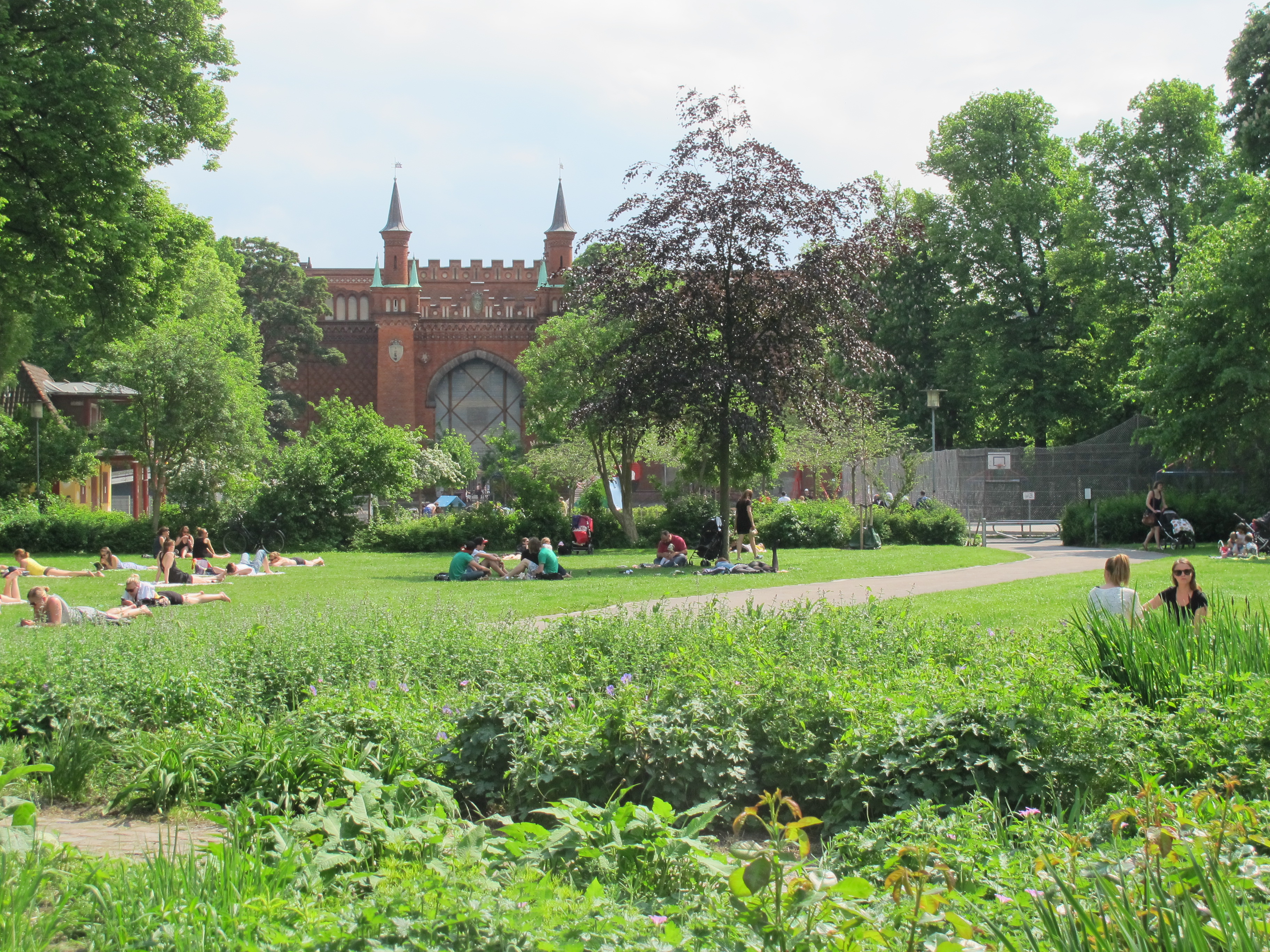 Skydebanehaven